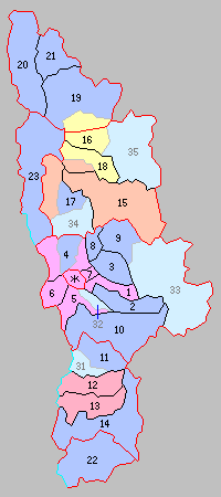 北海道上川支庁の町村。